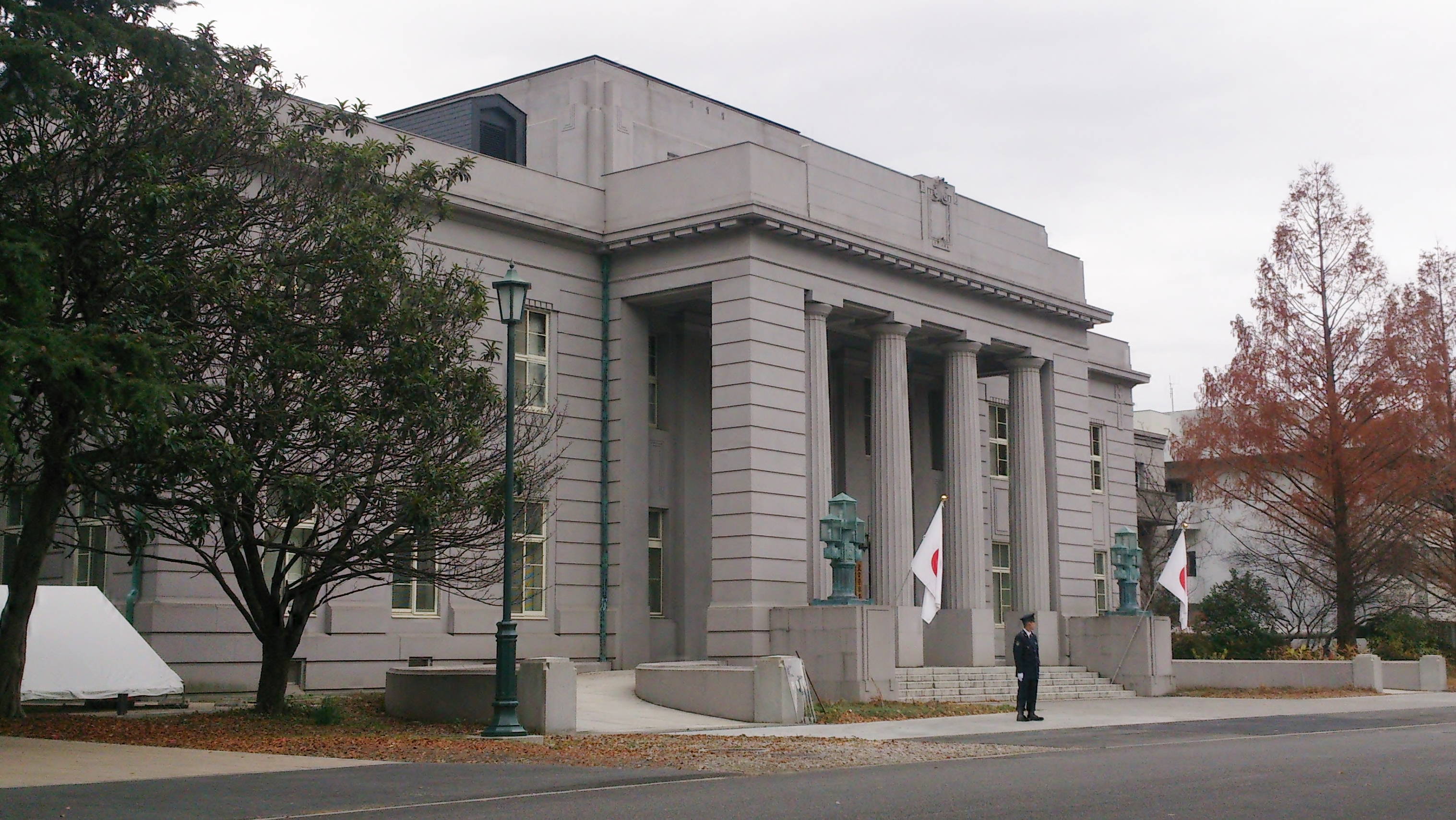 皇宮警察本部庁舎の外観。